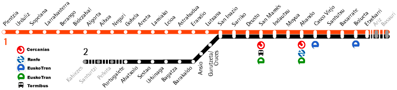 mapa de la red del metro de bilbao